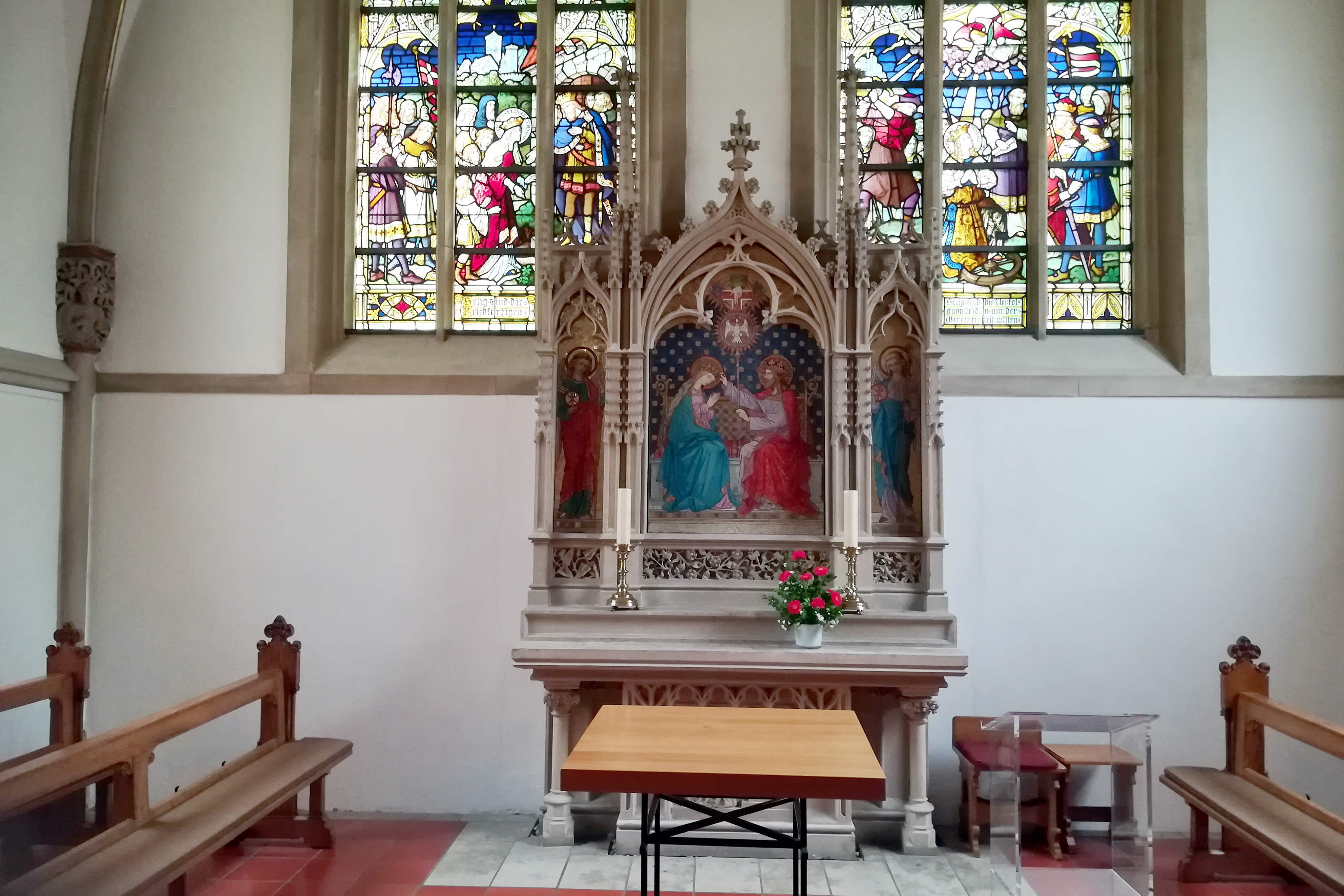 St. Felizitas ist die katholische Pfarrkirche im Zentrum der Stadt Lüdinghausen